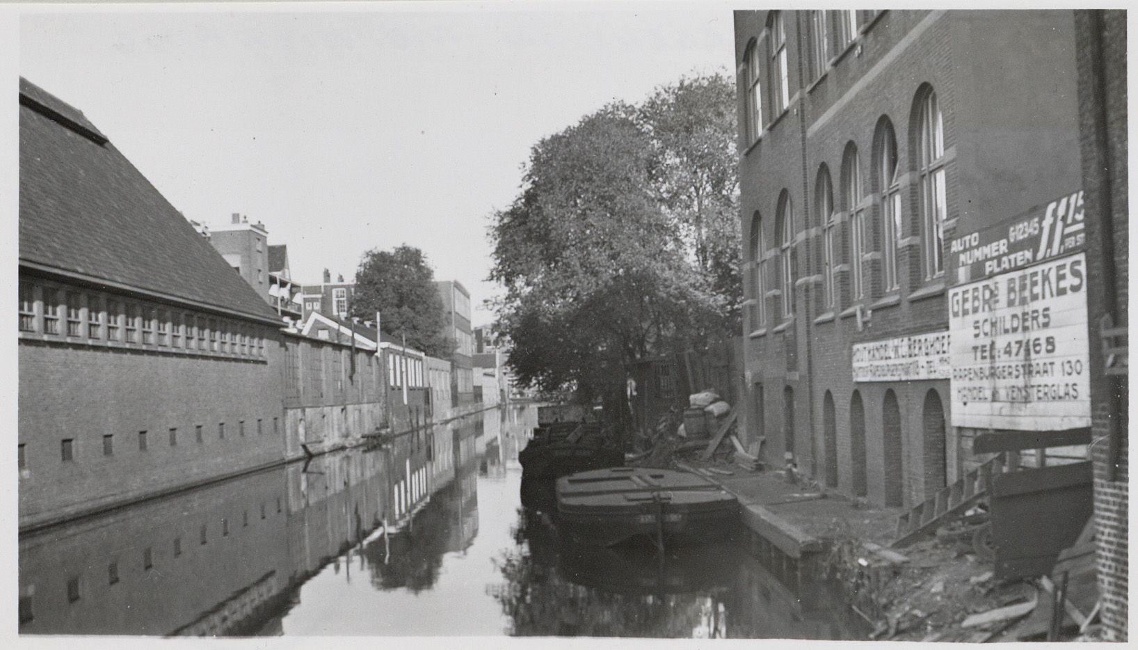 Beschrijving Markengracht Gezien richting Rapenburgwal Documenttype foto Vervaardiger Eck, J. van (Jacobus, 1873-1946) Collectie Collectie J. van Eck: foto's Datering 1936 Geografische naam Rapenburgwal Markengracht Inventarissen Afbeeldingsbestand A01634001567 Generated with Dememorixer